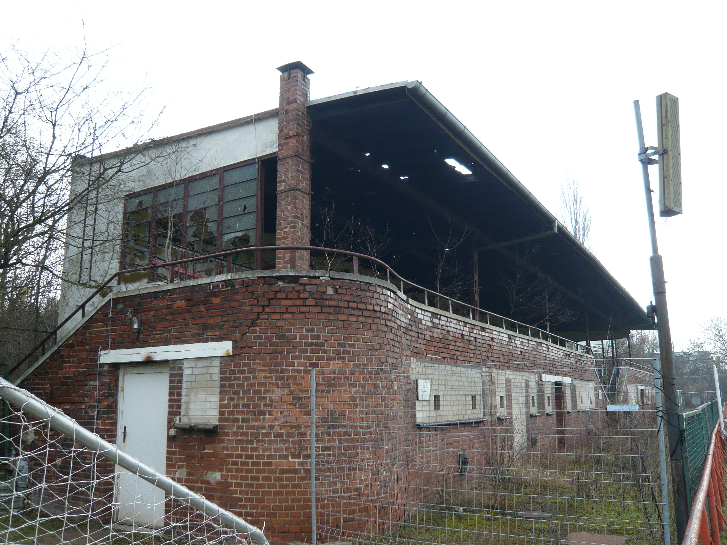 BVG-Stadion, desolater Zustand der Tribüne (2)